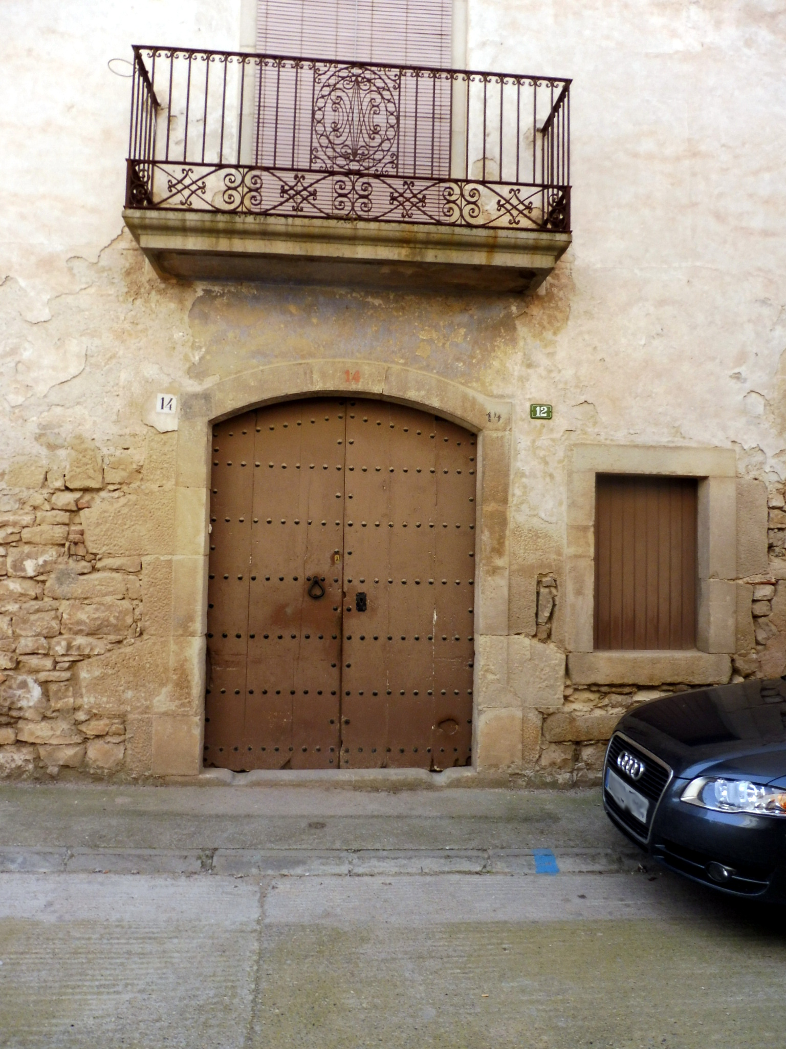 Casa Pubill de Belianes: portal